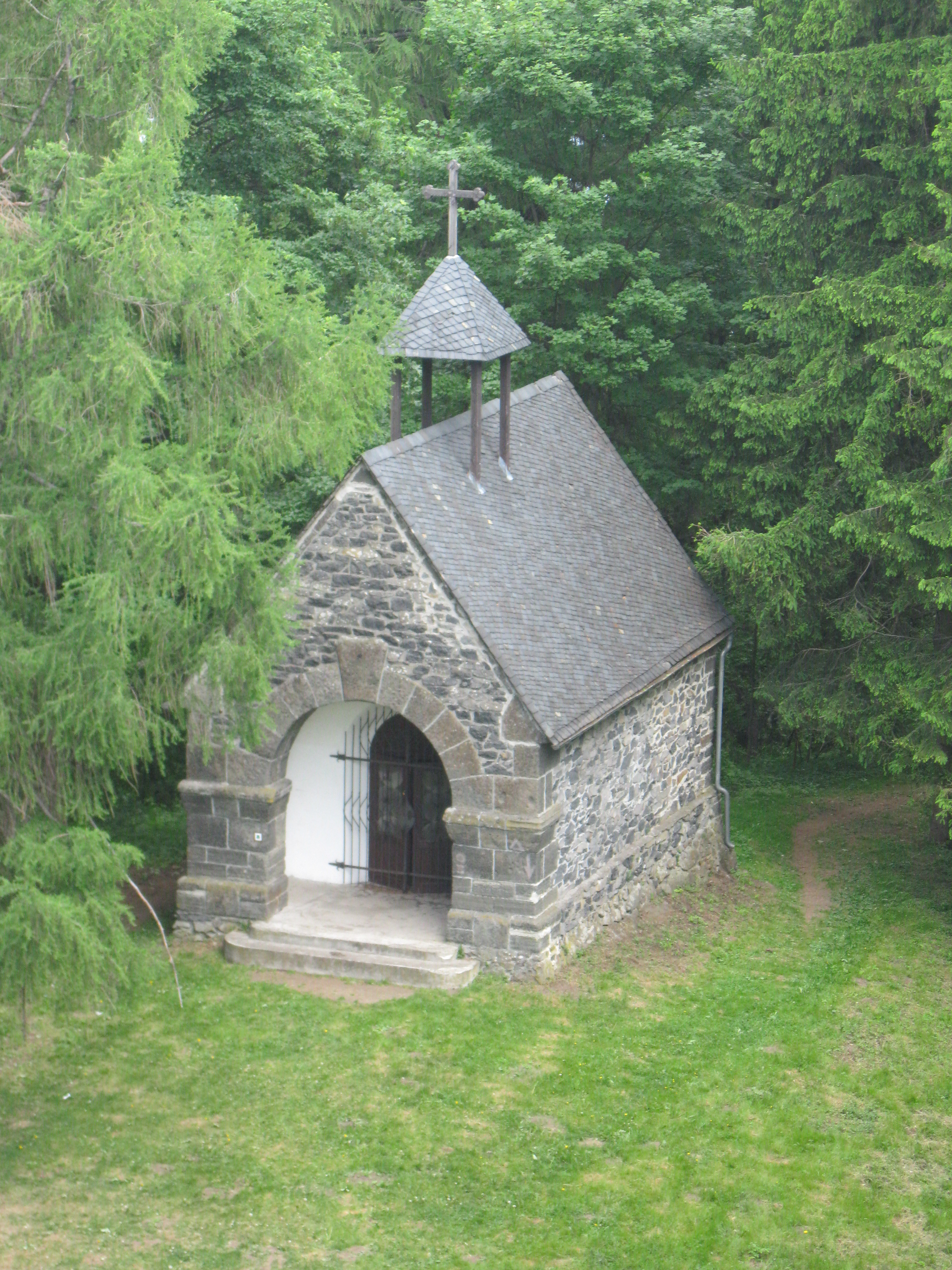 Kaple (Roudno)